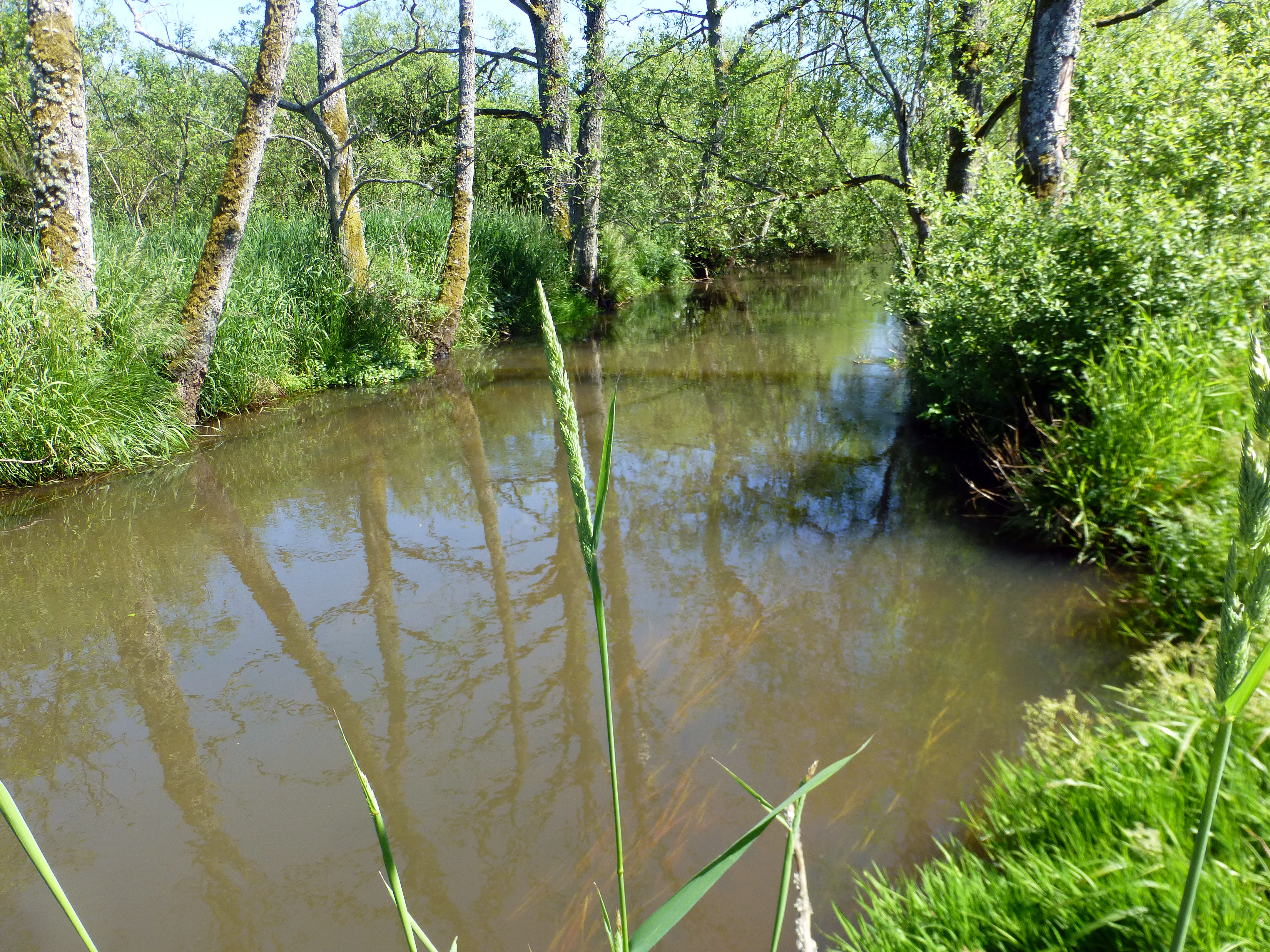 Funder Å kort før udløbet i Ørnsø